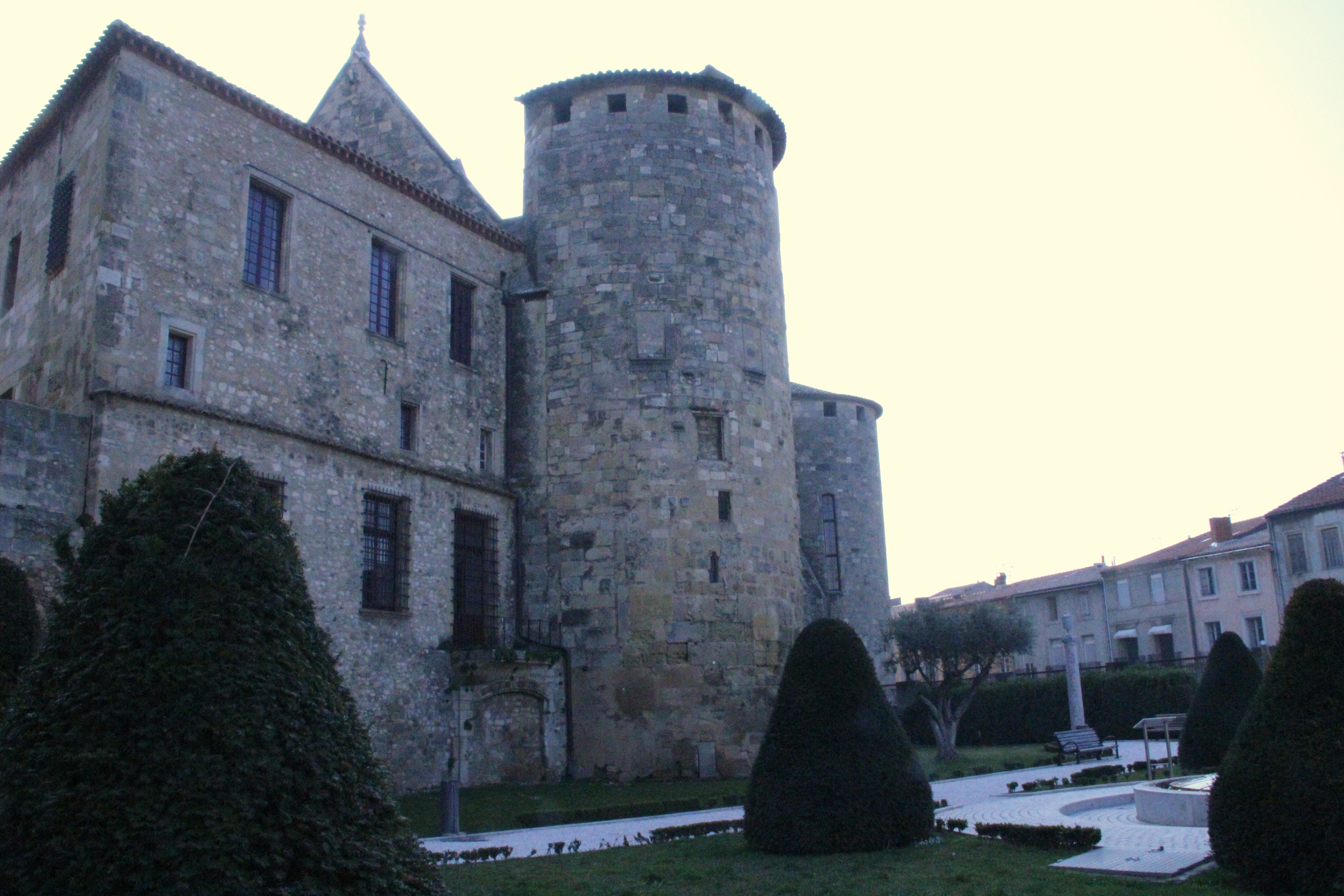 Palais épiscopal à coté de la cathédrale.